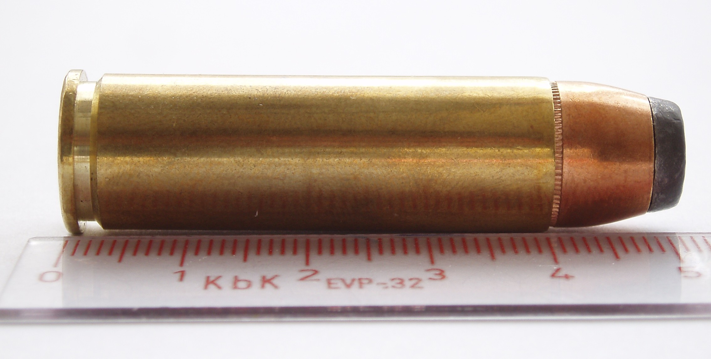 .500 SW Magnum revolver cartrdige.SP bullet.